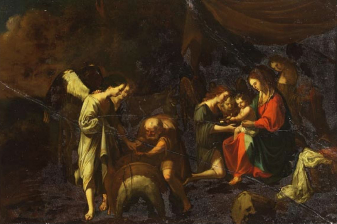 "Die Vorbereitung zur Flucht nach Ägypten", Öl auf Schiefer, fest auf Holz aufgelegt, 39 × 26 cm. Um 1605 bis 1610. 2007 in der Fernsehsendung Lieb & Teuer des NDR gezeigt und besprochen.